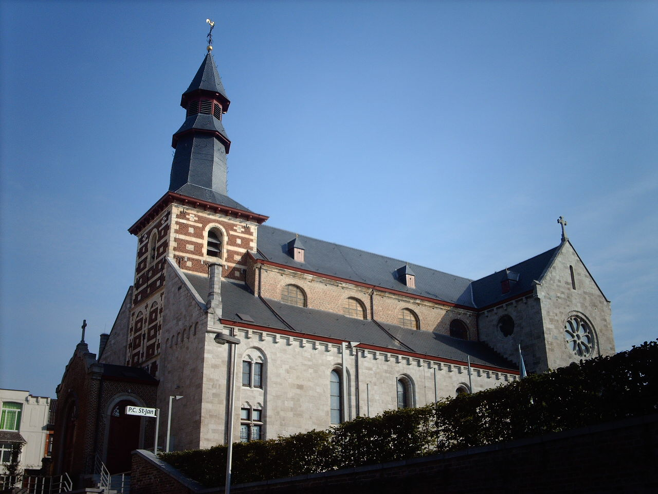 Sint-Jan Baptistkerk te Tongeren vanuit de Sint-Jansstraat